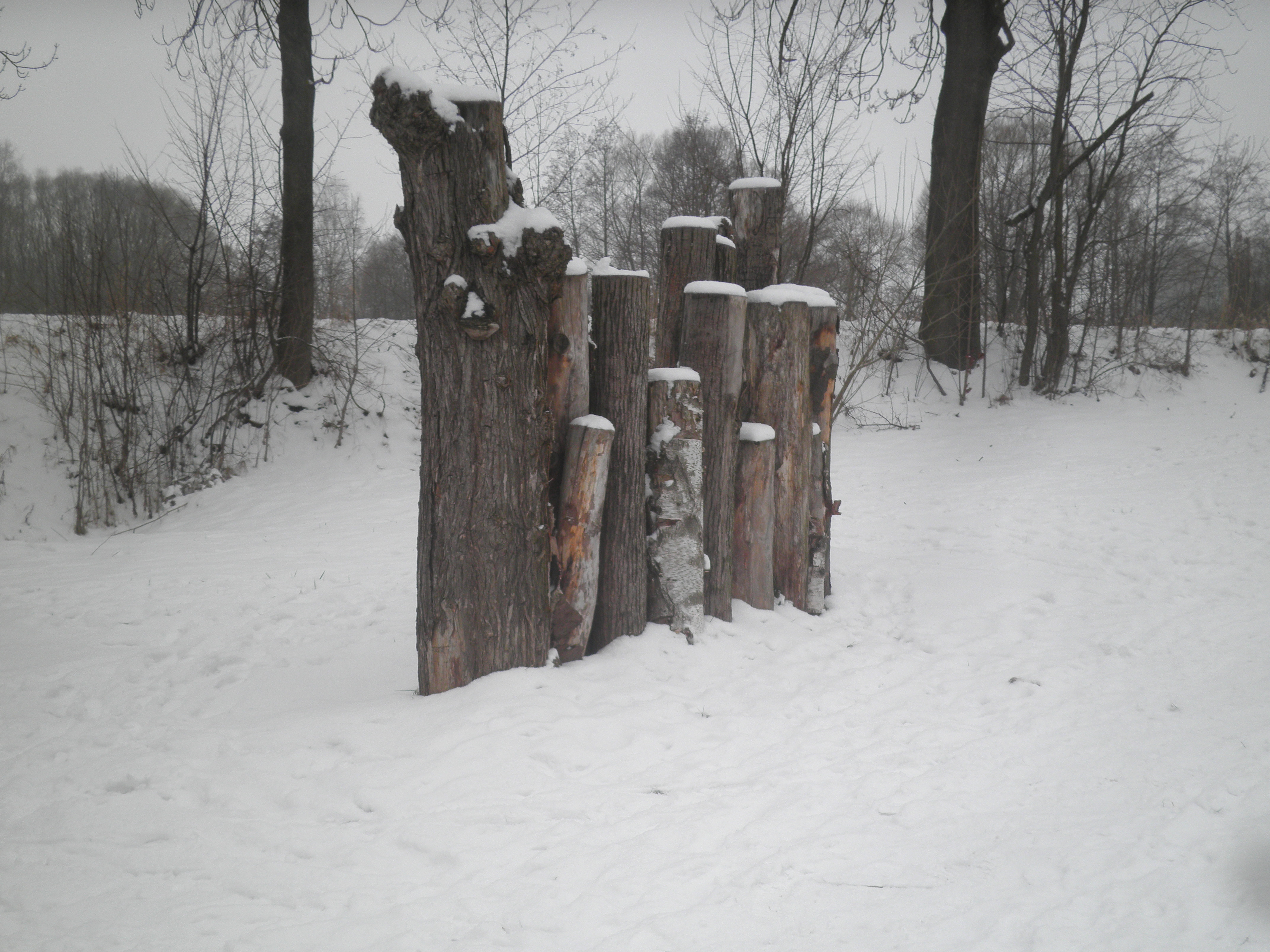 Loggery (broukoviště) u Panského rybníku.